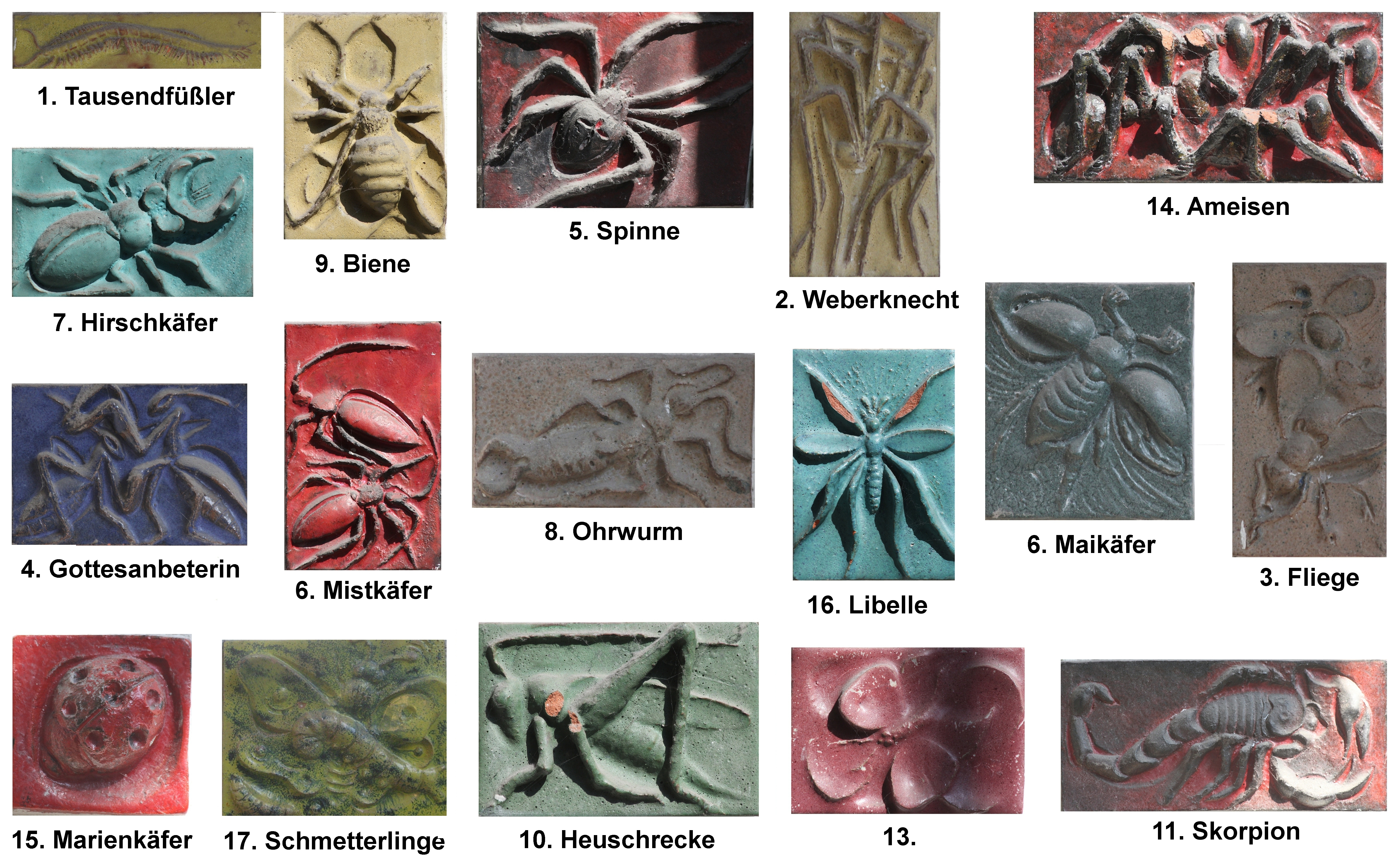 Wandgestaltung (Einzelansichten) von Eva Zippel mit 17 farbigen, keramischen Reliefs mit Insektenkacheln auf Rauputz (Kellenwurf), Glattputz und mit Kratzputzlinien, 1961, Stuttgart, Königin-Olga-Stift, Treppenwand zur Turnhalle. Nummerierung der Kacheln: von oben nach unten.